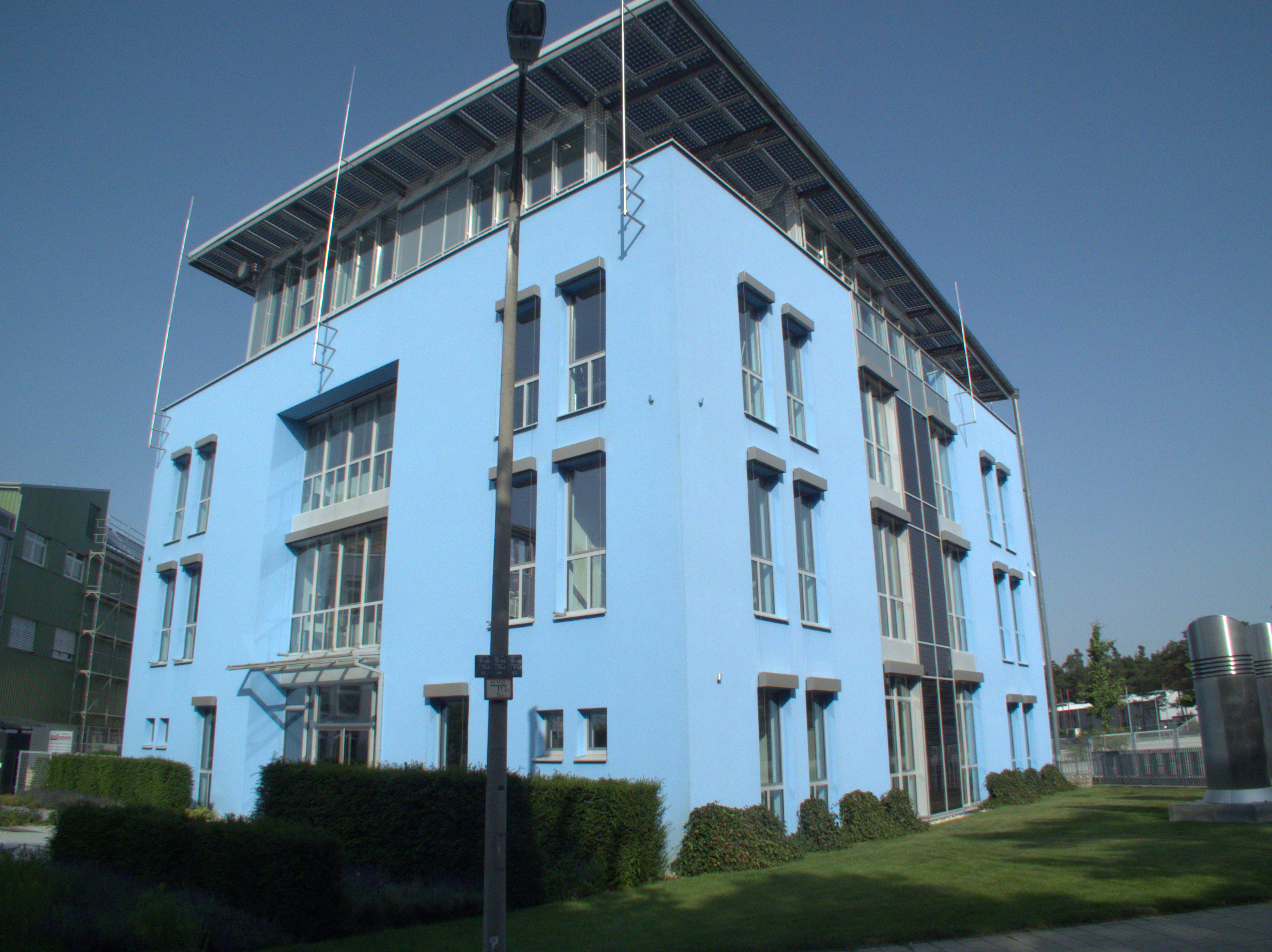 Die Zentrale des Pharma-Herstellers Bionorica in der Kerschensteiner Straße in Neumarkt